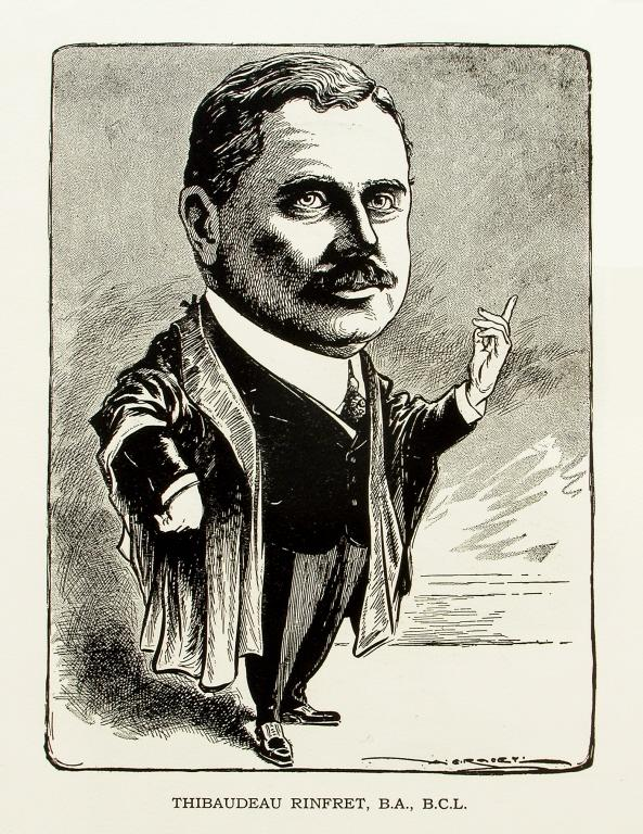 Impression de Thibaudeau Rinfret, B.A., B.C.L. Encre sur papier.